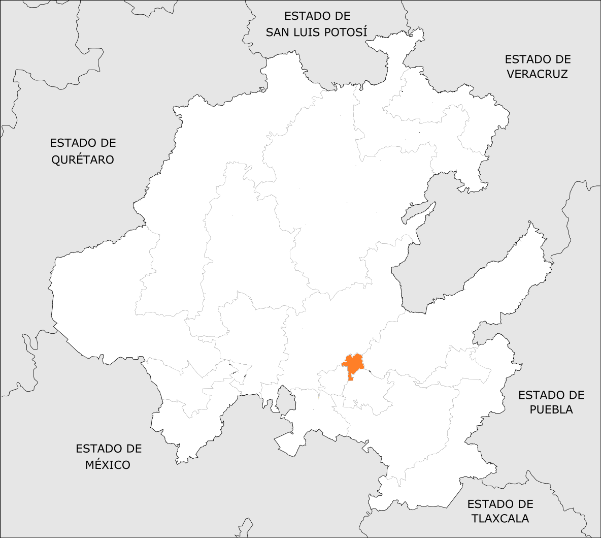 Distrito Electoral Local de Hidalgo 12